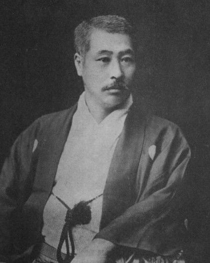 後藤猛太郎伯爵